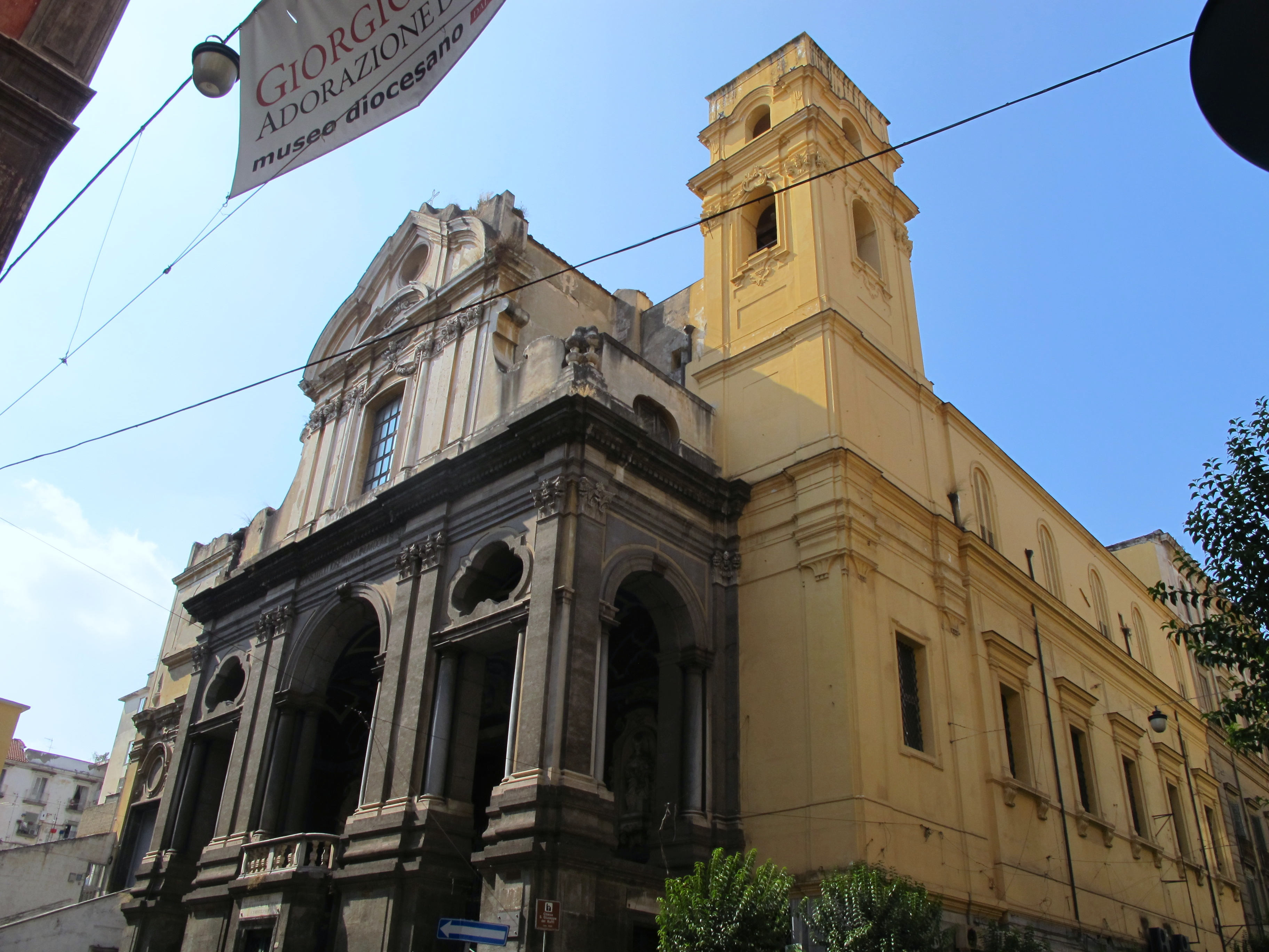 Chiesa di San Giuseppe dei Ruffi, Napoli.